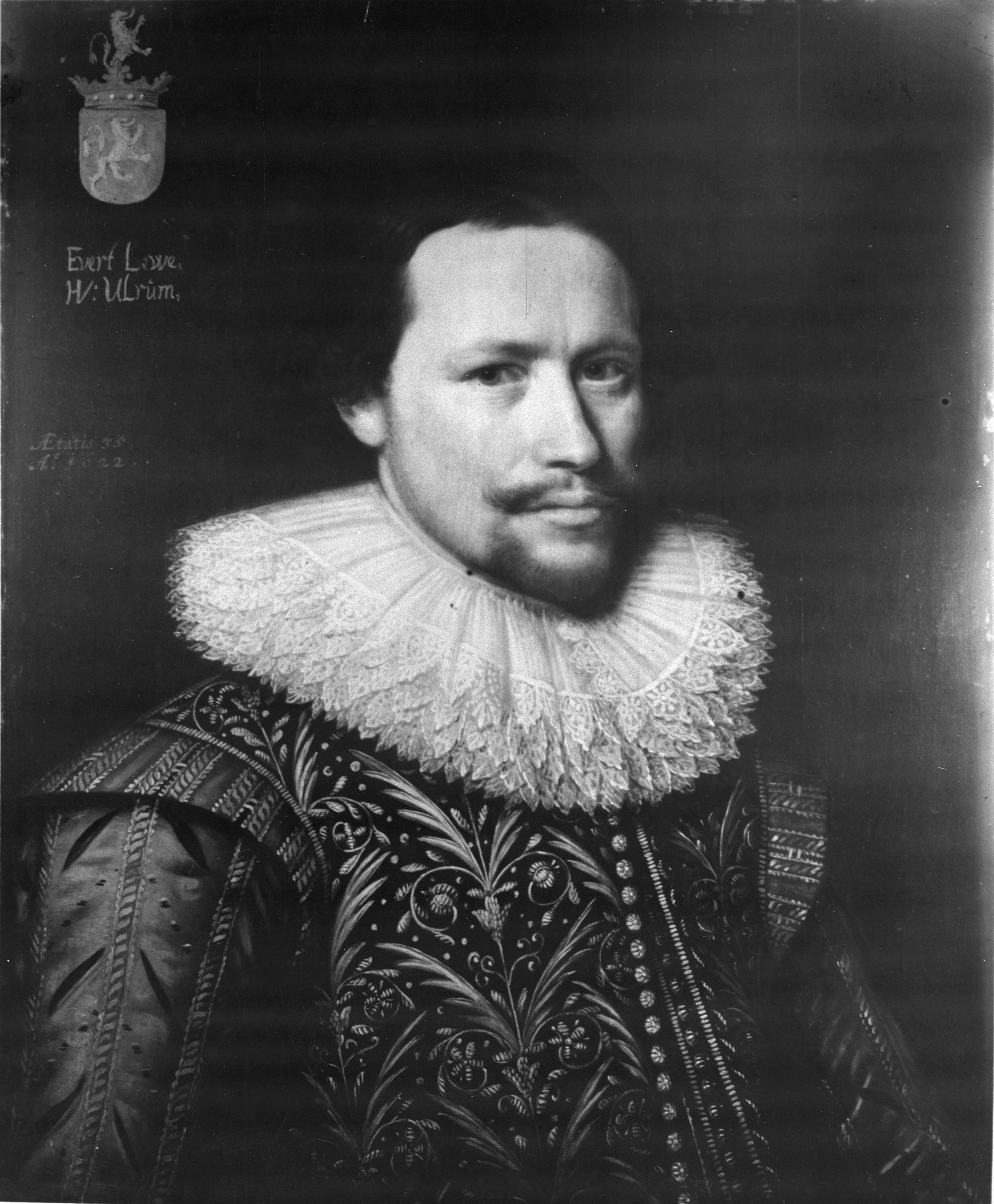 Portret van Evert Lewe († 1641)